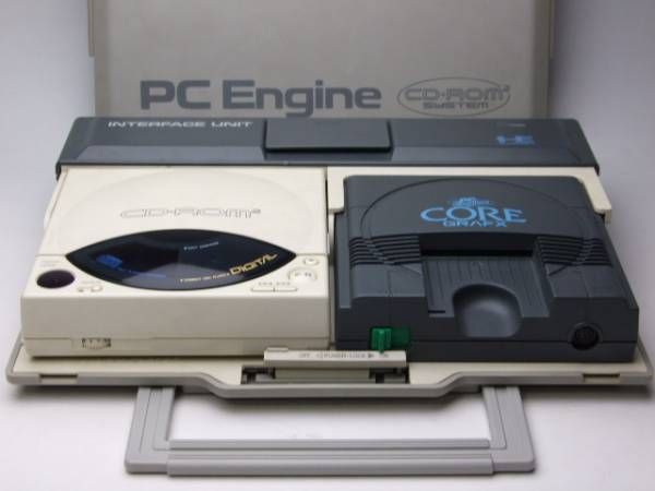 NECホームエレクトロニクス、PC Engine CD-ROM2 Interface Unit Category:ゲーム機画像 Category:PCエンジン